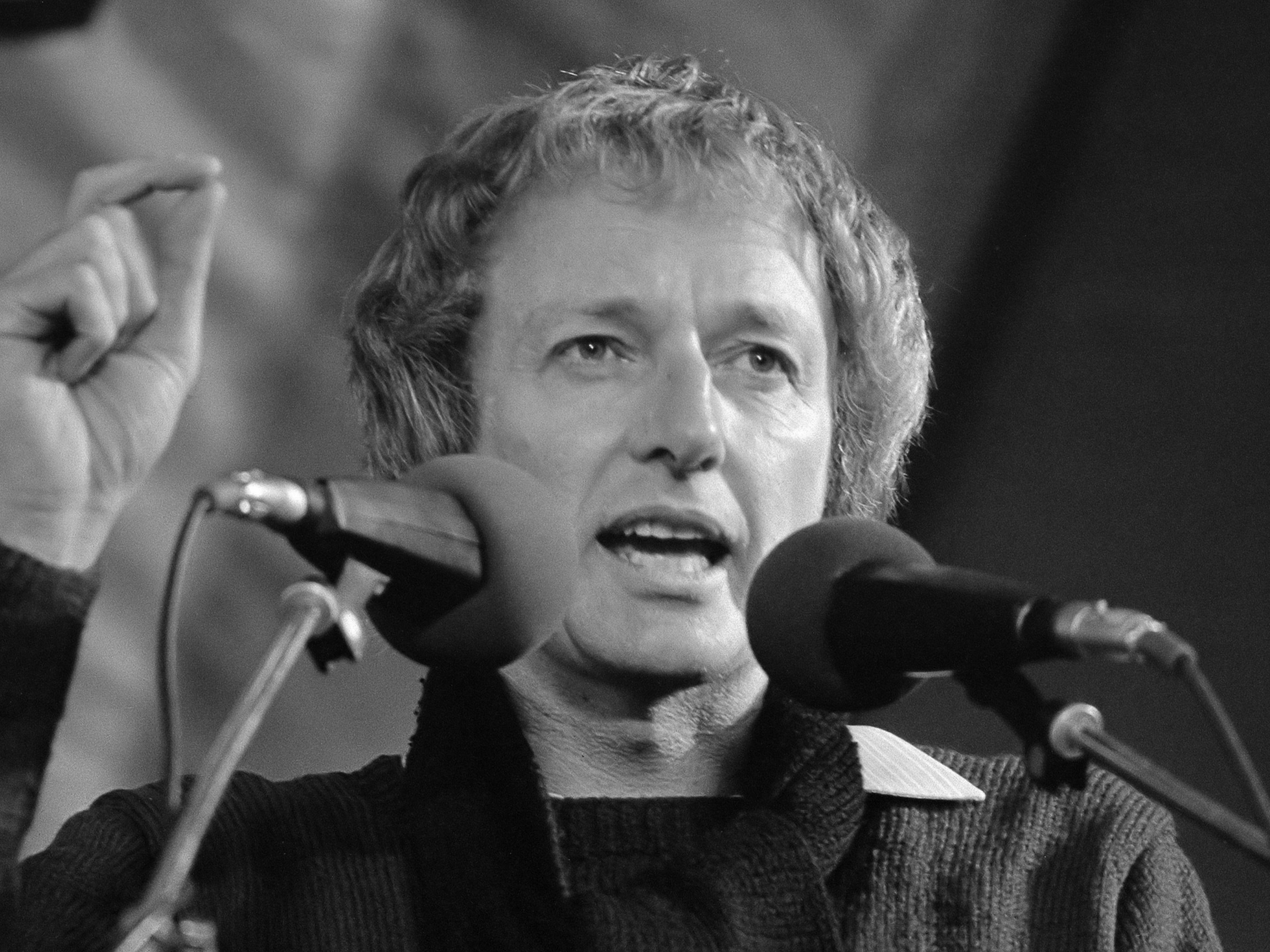 IKV-secretaris Mient Jan Faber houdt een toespraak in het Zuiderpark 29 oktober 1983